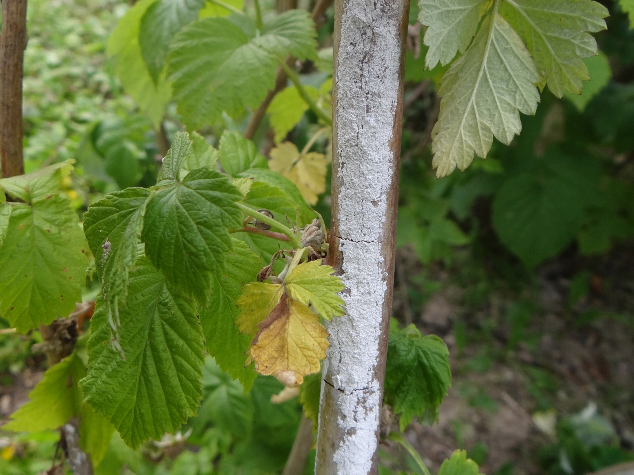 Didymella applanata on Rubus idaeus